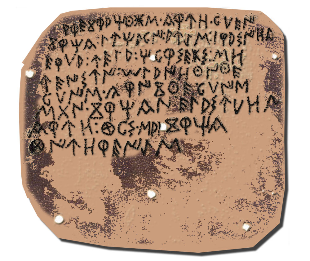 Reproducción del "bronce de Luzaga" actualmente esta pieza arquologica se encuentra en paradero desconocido. autor user:papix